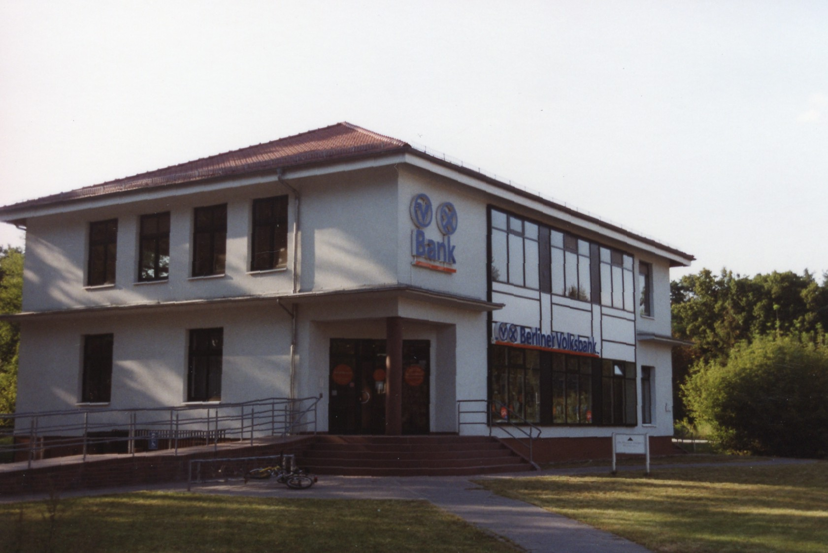 Ortsteil Wandlitz der Gemeinde Wandlitz